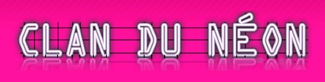 Logo de mouvement militant "Clan du Néon" pour l'extinction des enseignes lumineuses allumées la nuit alors que le commerce est fermé.